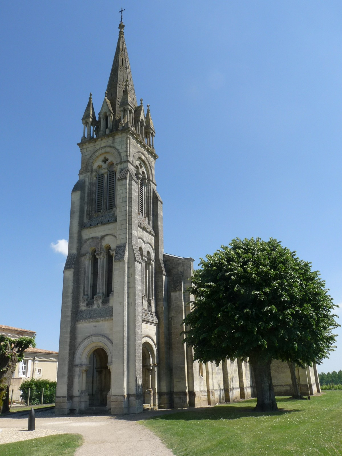 Eglise de Cadillac-en-Fronsadais, Gironde, France